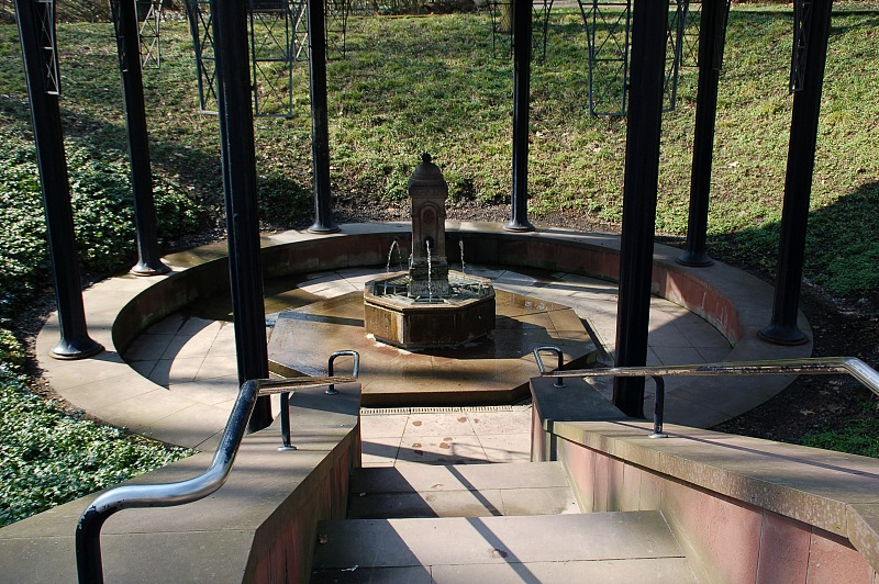 Weilbach, Bad Weilbacher Schwefelquelle, Nassau, Hesse, Hessen, Germany, Deutschland